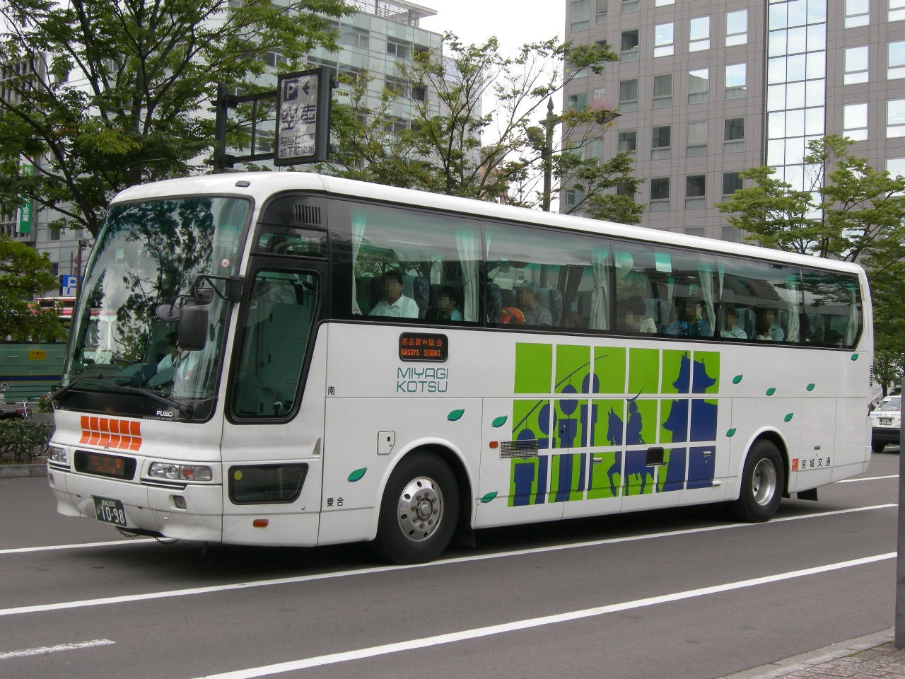 宮城交通 三菱KL-MS86MP（夜行高速路線用）仙台南営業所所属登録番号：宮城200か10-98（イベント時に撮影）